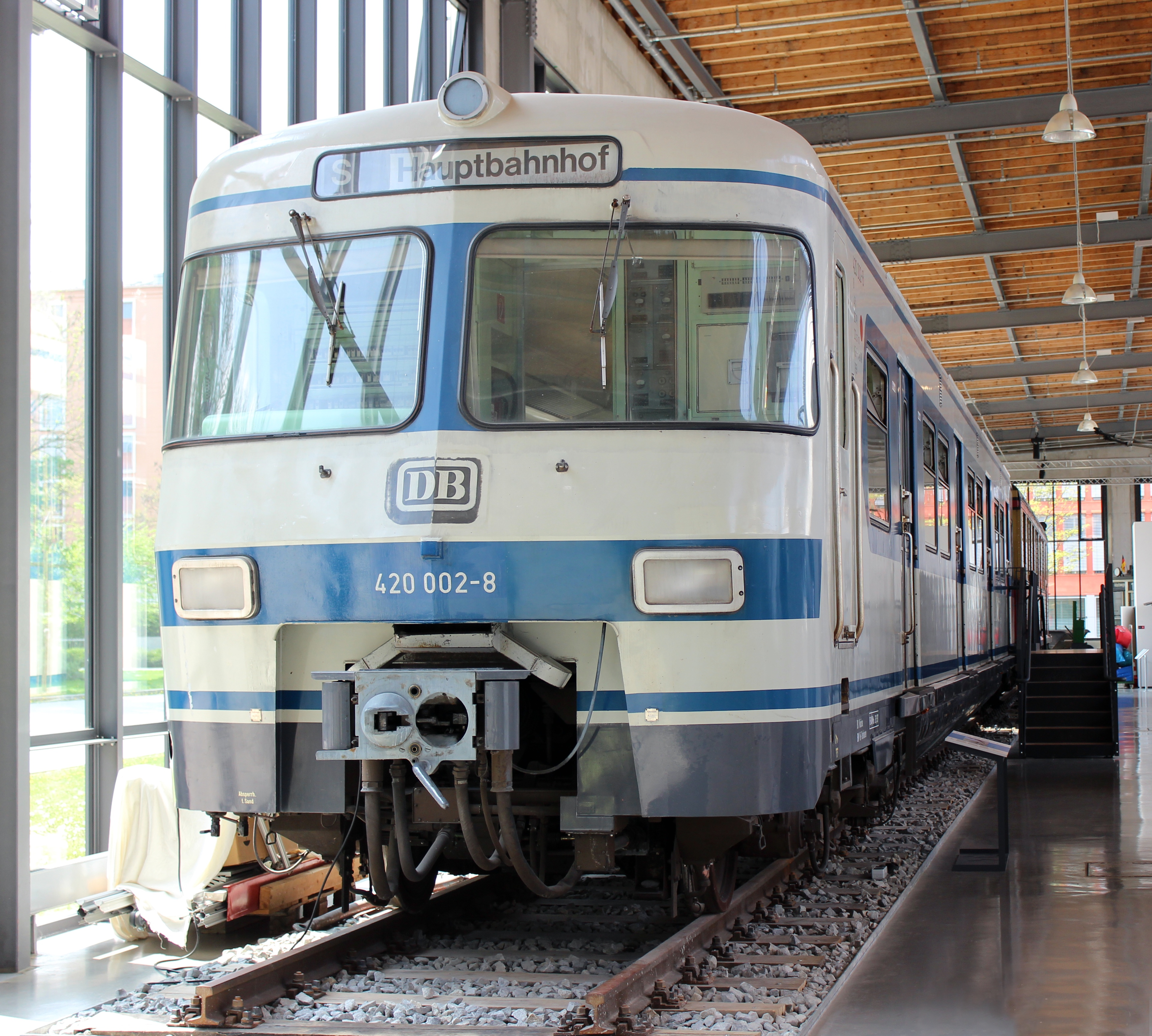 Die ausgemusterte S-Bahnlegende ET420. Hier steht sie in einem Museum, "draußen" ist sie zum Teil noch im Einsatz - wenn auch nicht mehr in München, was den Regelfahrplan angeht.